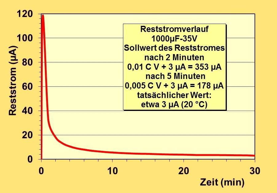 Typische Reststrom-Einschaltkurve